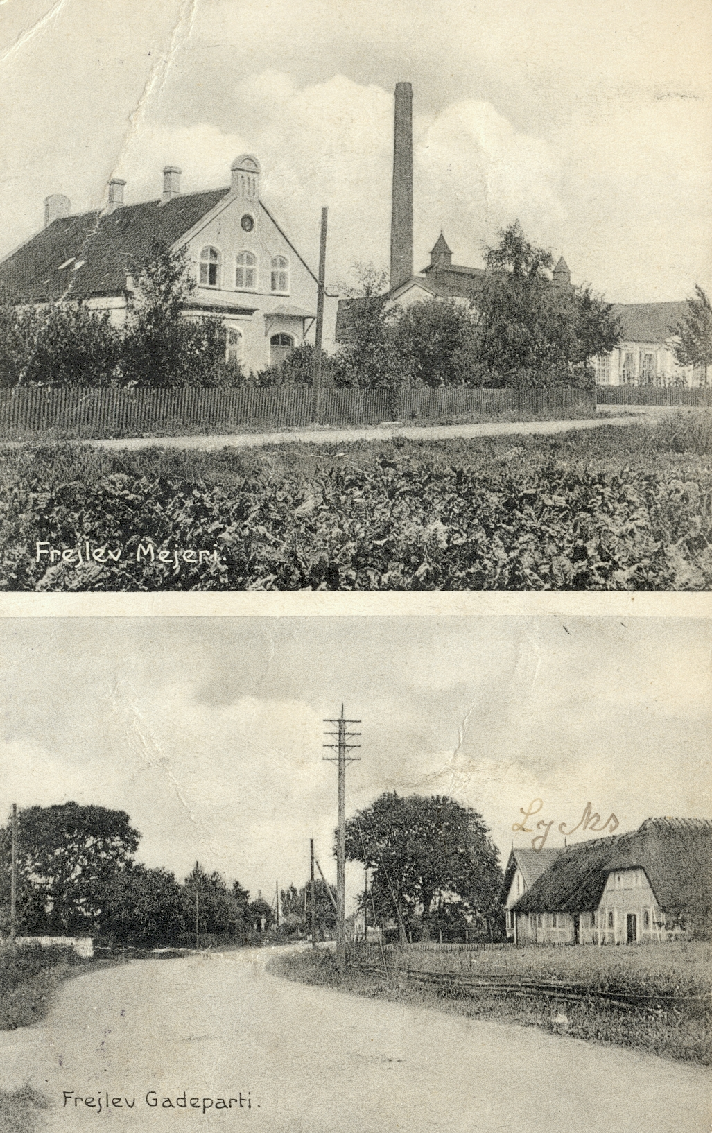 Postkort fra Frejlev på Østlolland. Øverst Frejlev Mejeri - Nederst Frejlev Gadeparti med gårdmand Lars Lycks gård til højre markeret med håndskrift.